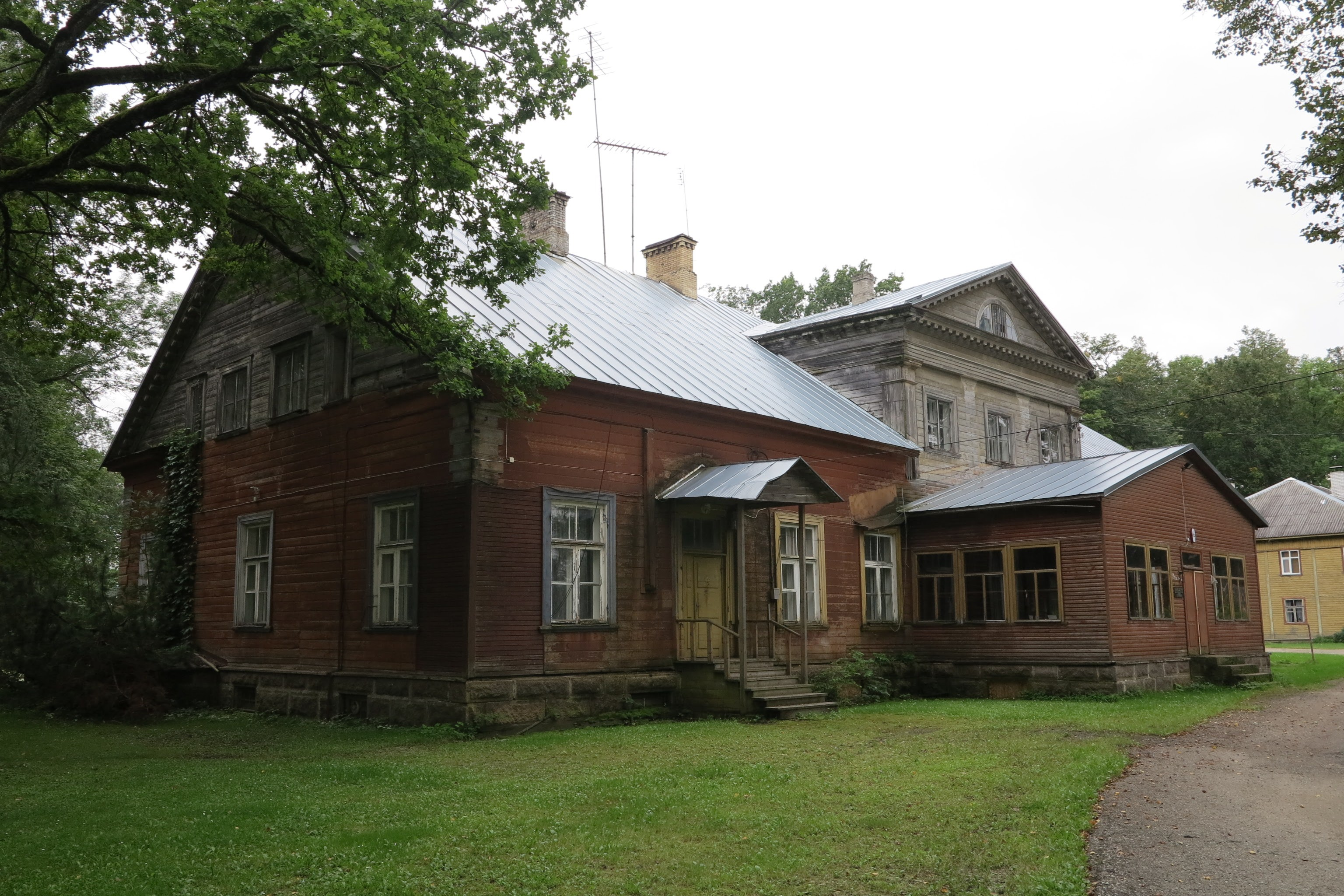 Pagari mõisa peahoone 2012. aastal.